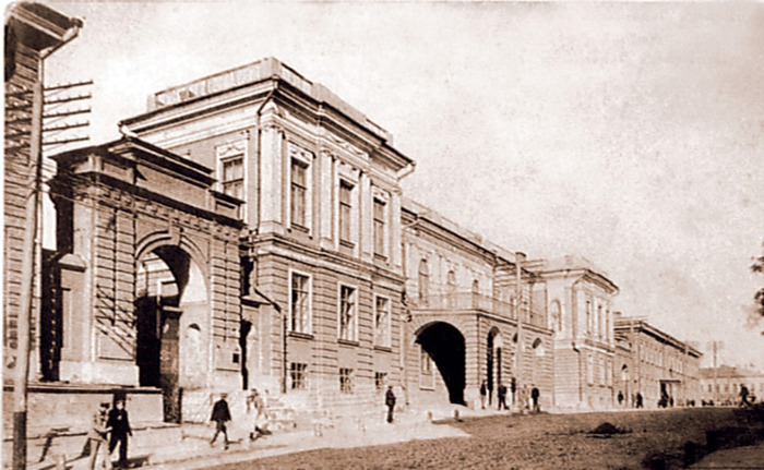 Харківський університет - Старий корпус. На передньому плані одна із вхідних брам.